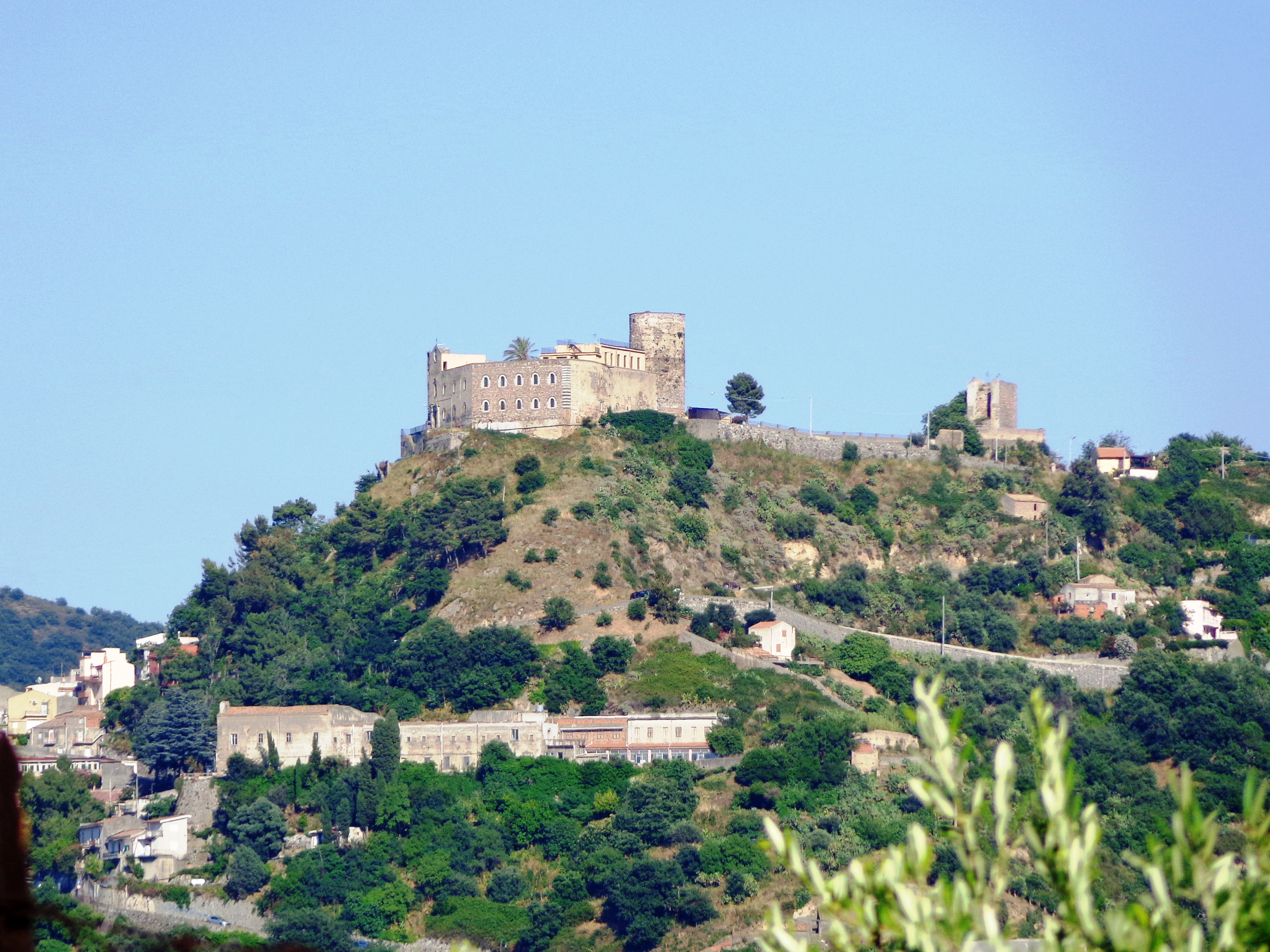 Veduta panoramica del castello di Santa Lucia del Mela, prospetto orientale